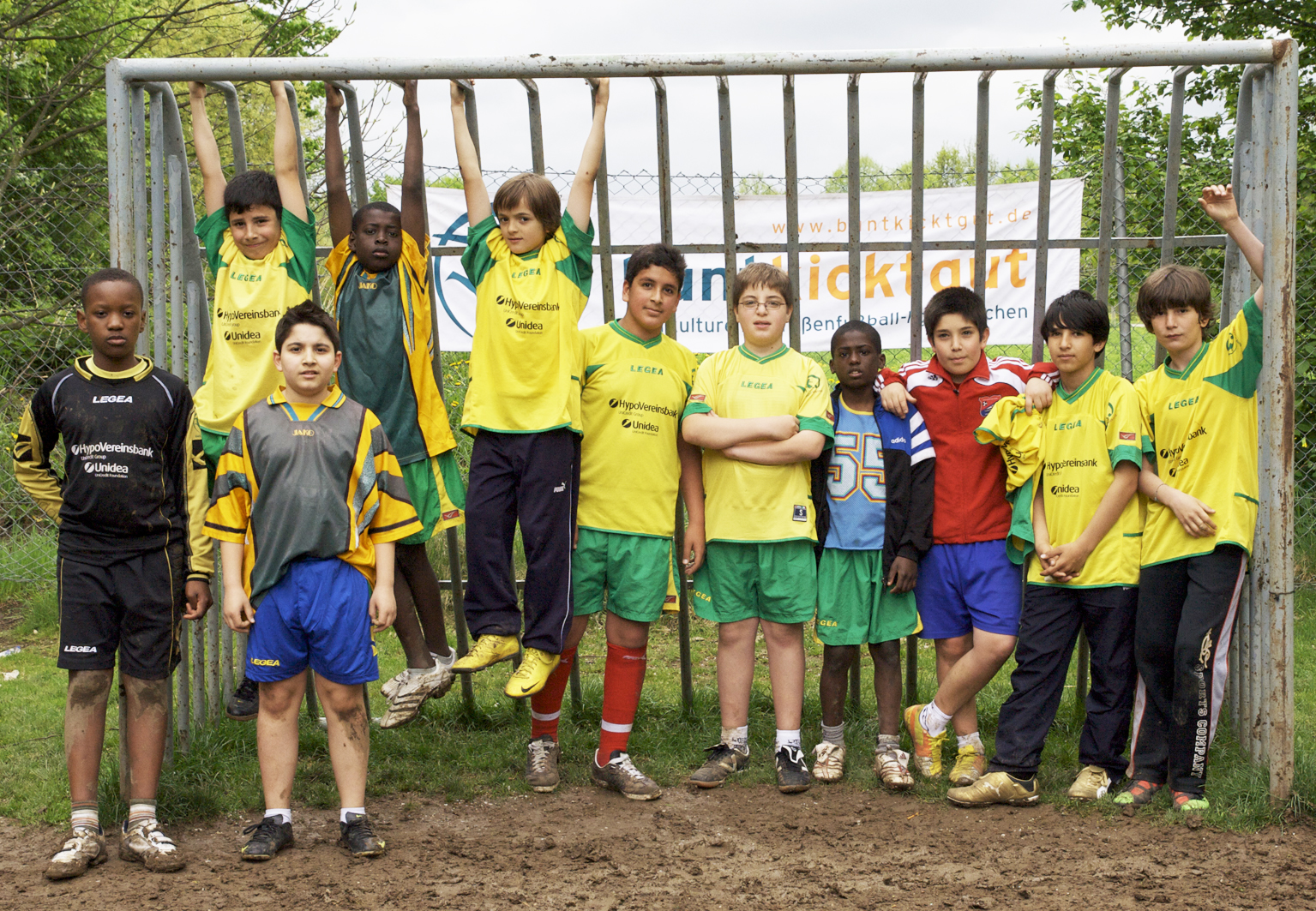 Das Team „Harras Boys“ aus München – Pro Jahr nehmen alleine in München mehr als 250 Mannschaften an der Straßenfußball-Liga teil